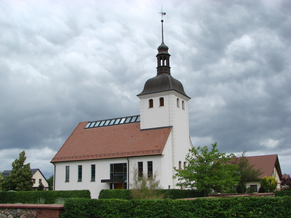 Nachbau der abgebrochenen Kirche des devastierten Dorfes Horno. Sitz des kirchlichen Informations- und Begegnungszentrum Horno.